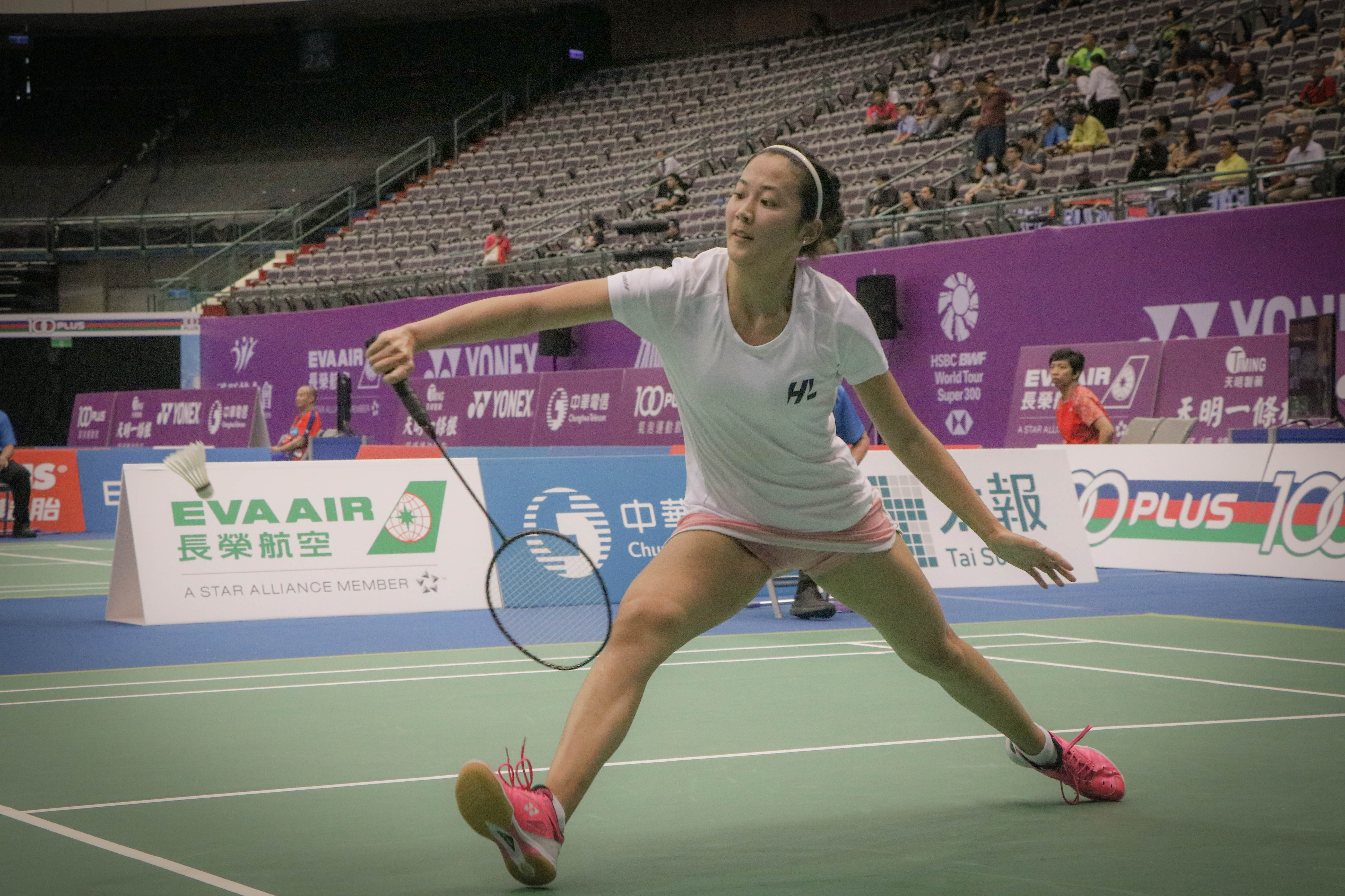 2018 台北OPEN 10/03